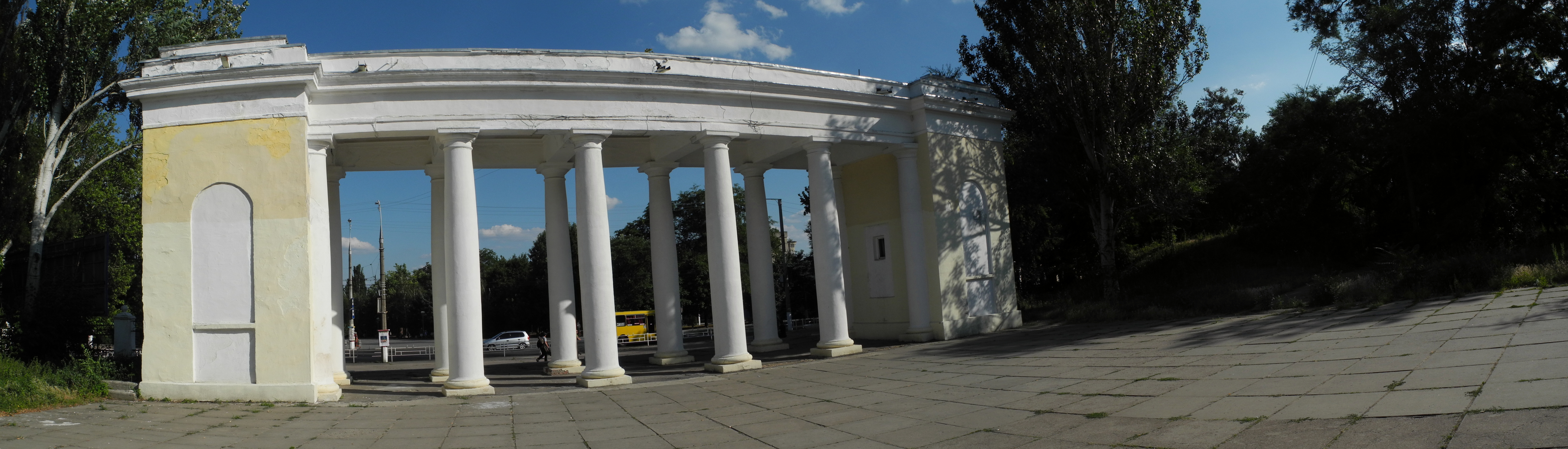 Арка-вход в парк им. Ленинского Комсомола